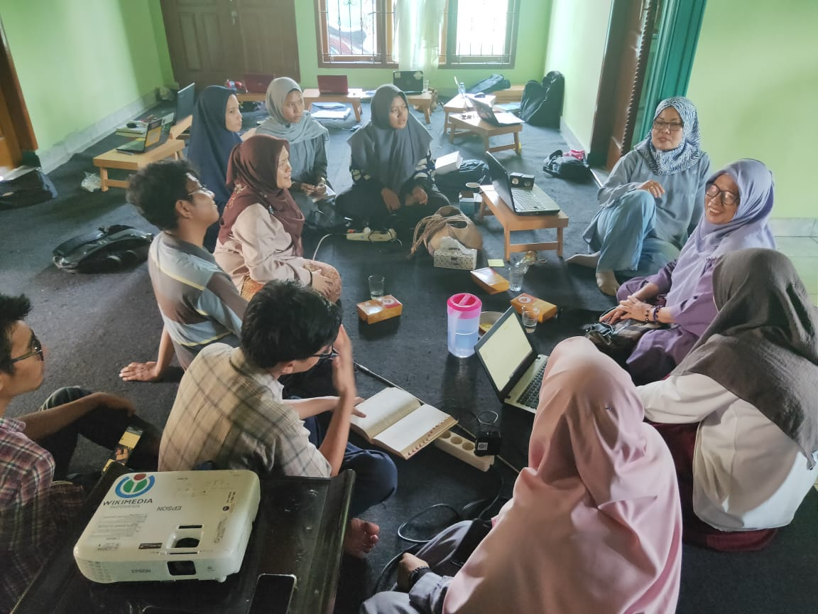 Kopdar di Padang